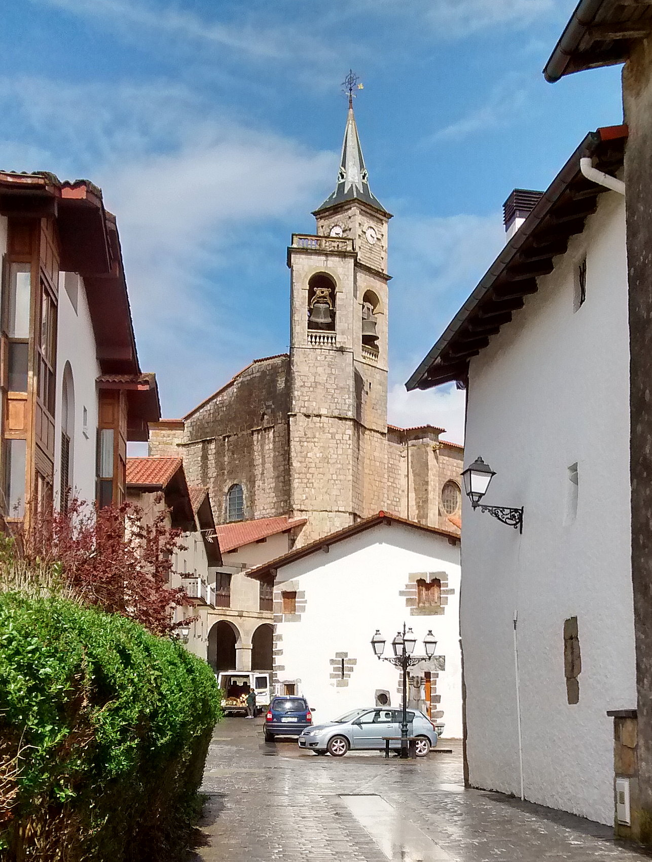 Elizmendiko San Pedro eliza - Asteasu